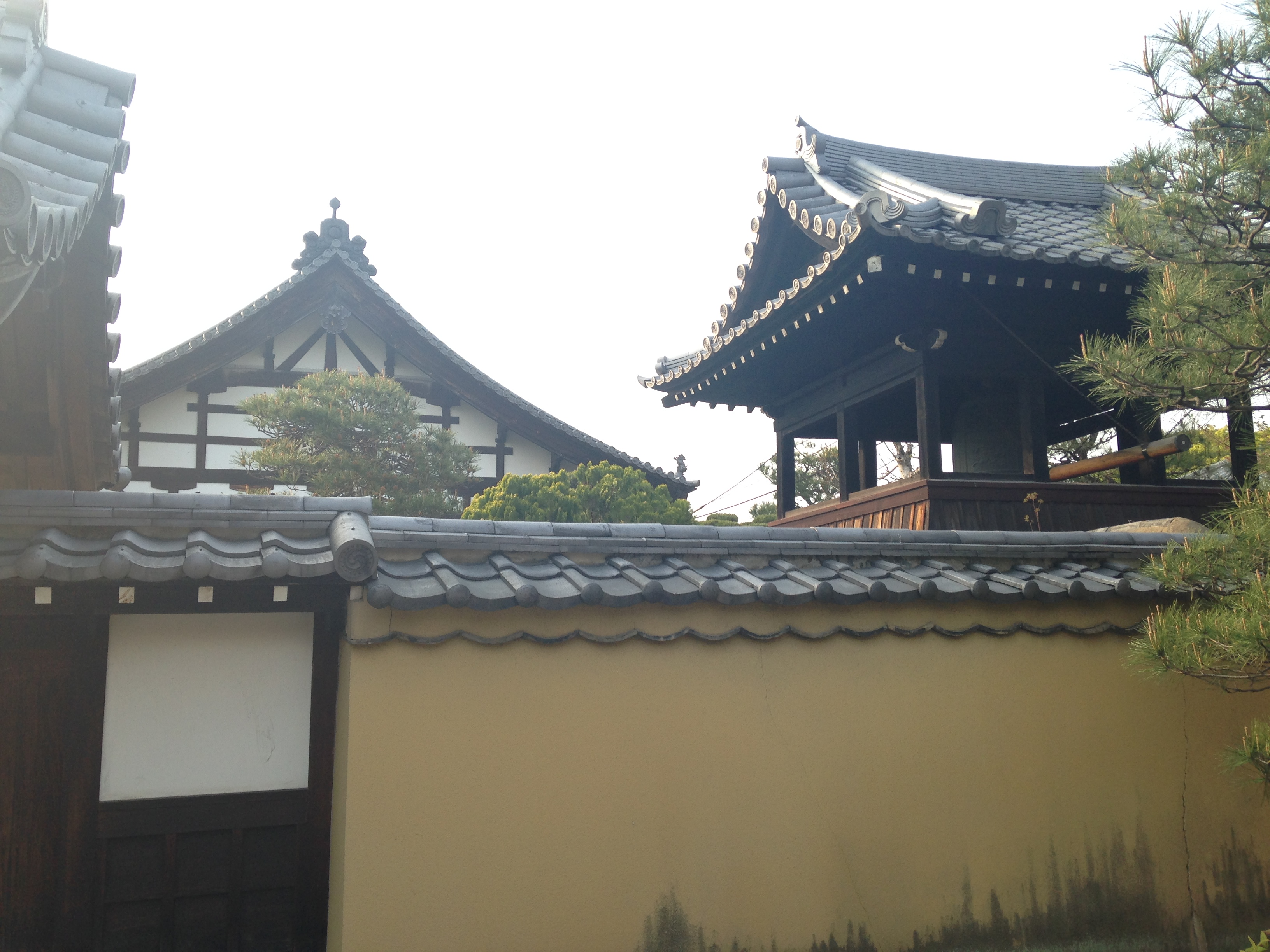 崇福寺・庫裏と鐘楼の遠望